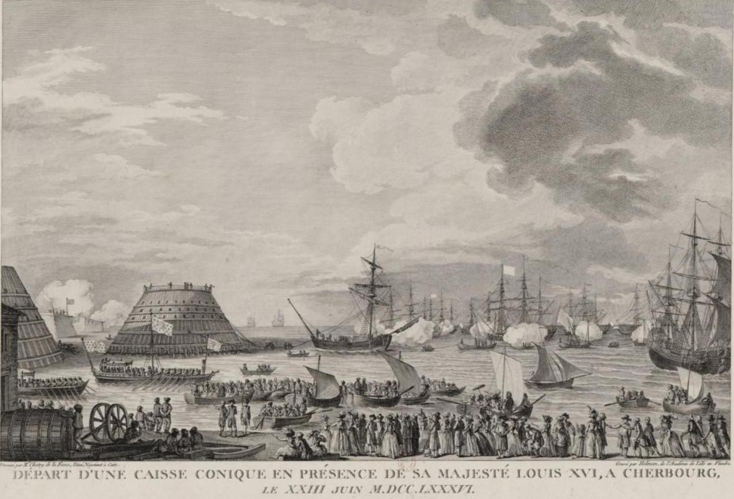 Gravure réalisée à l'occasion de la visite de Louis XVI à Cherbourg en 1786 pour voir le chantier de construction de la digue et de l'arsenal.